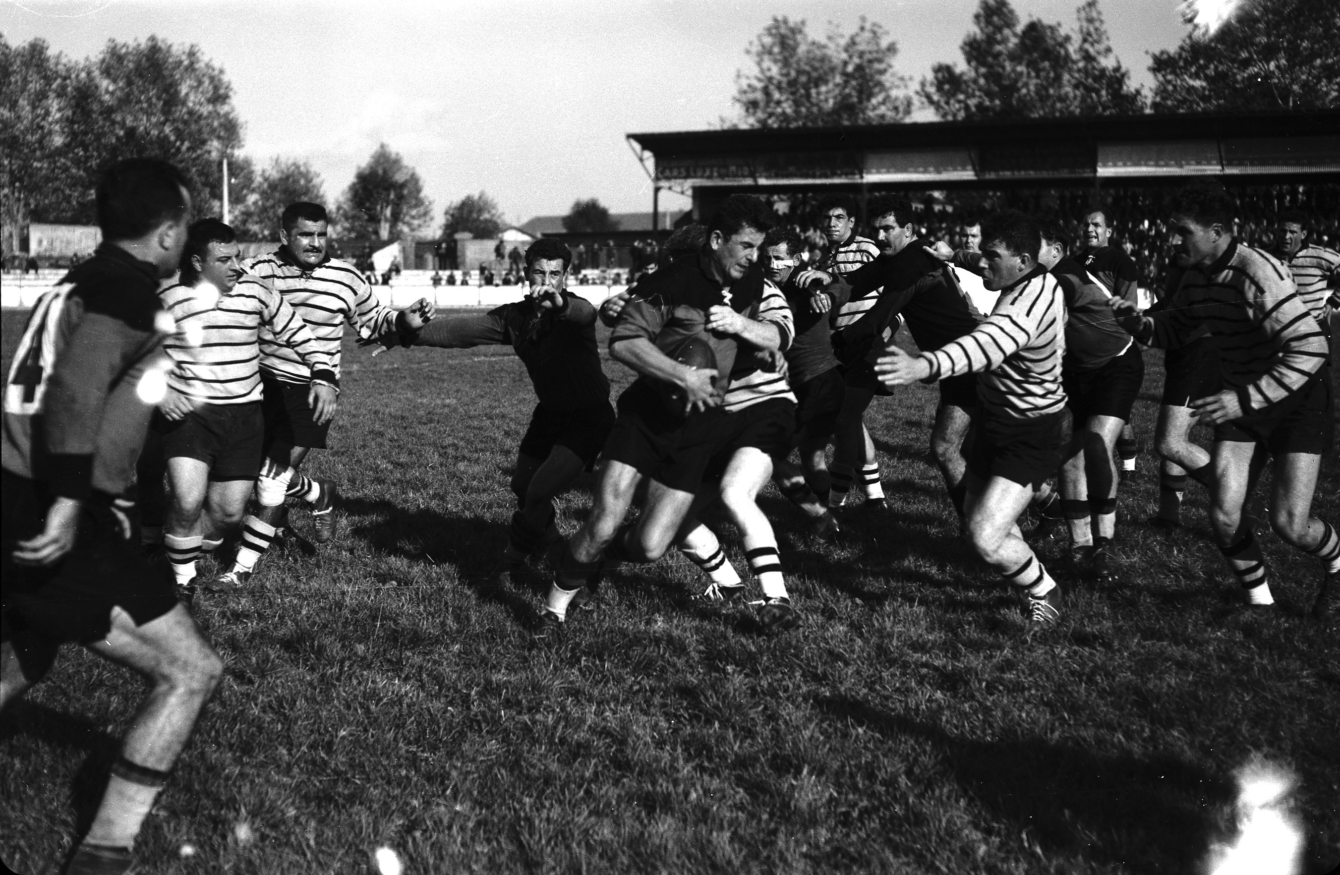 Stade Ernest Wallon. Le 27 Octobre 1957. Vue d'une phase de jeu entre le Stade Toulousain et La Rochelle.